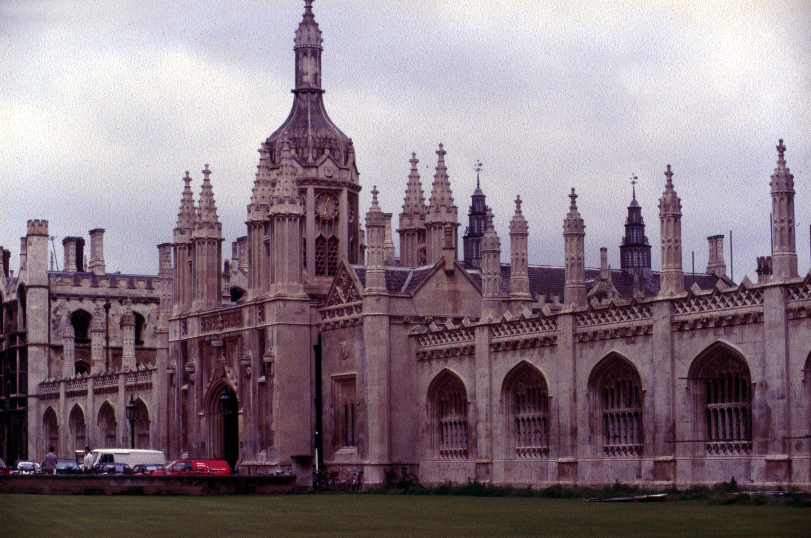 1985 in Cambridge